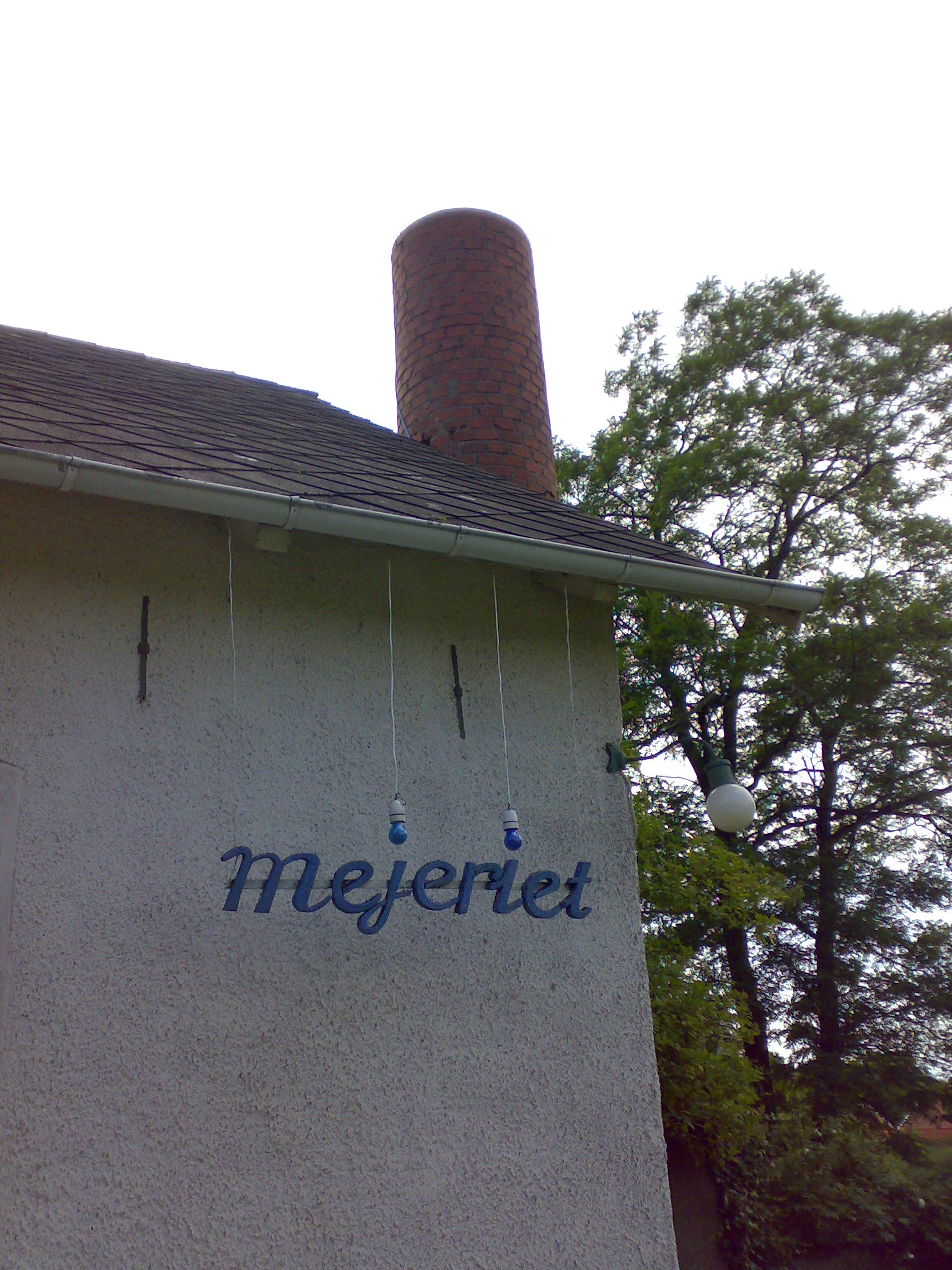 Mejeriet, Vickleby, Öland, Sverige, Sweden